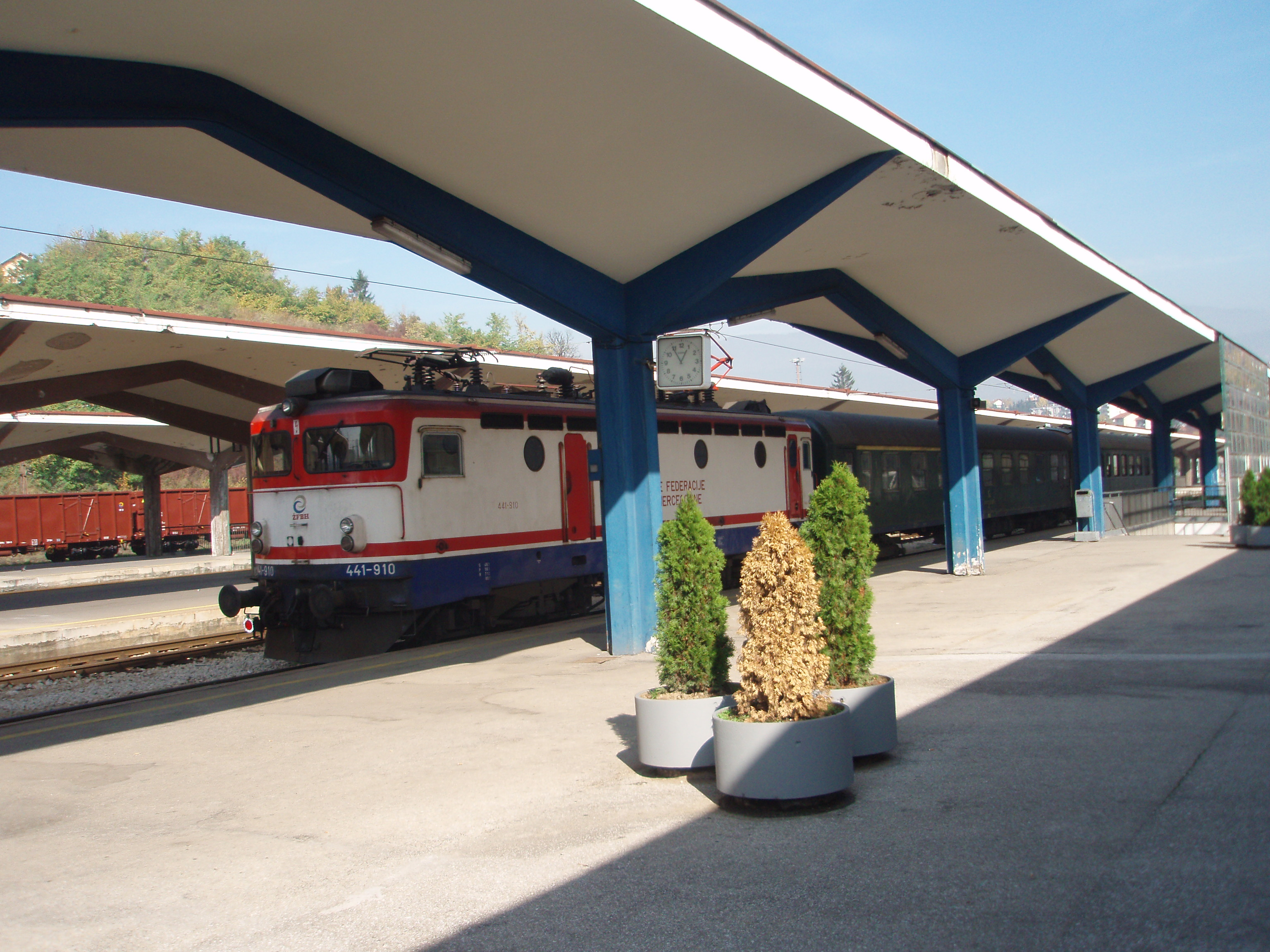 Železnička stanica Sarajevo